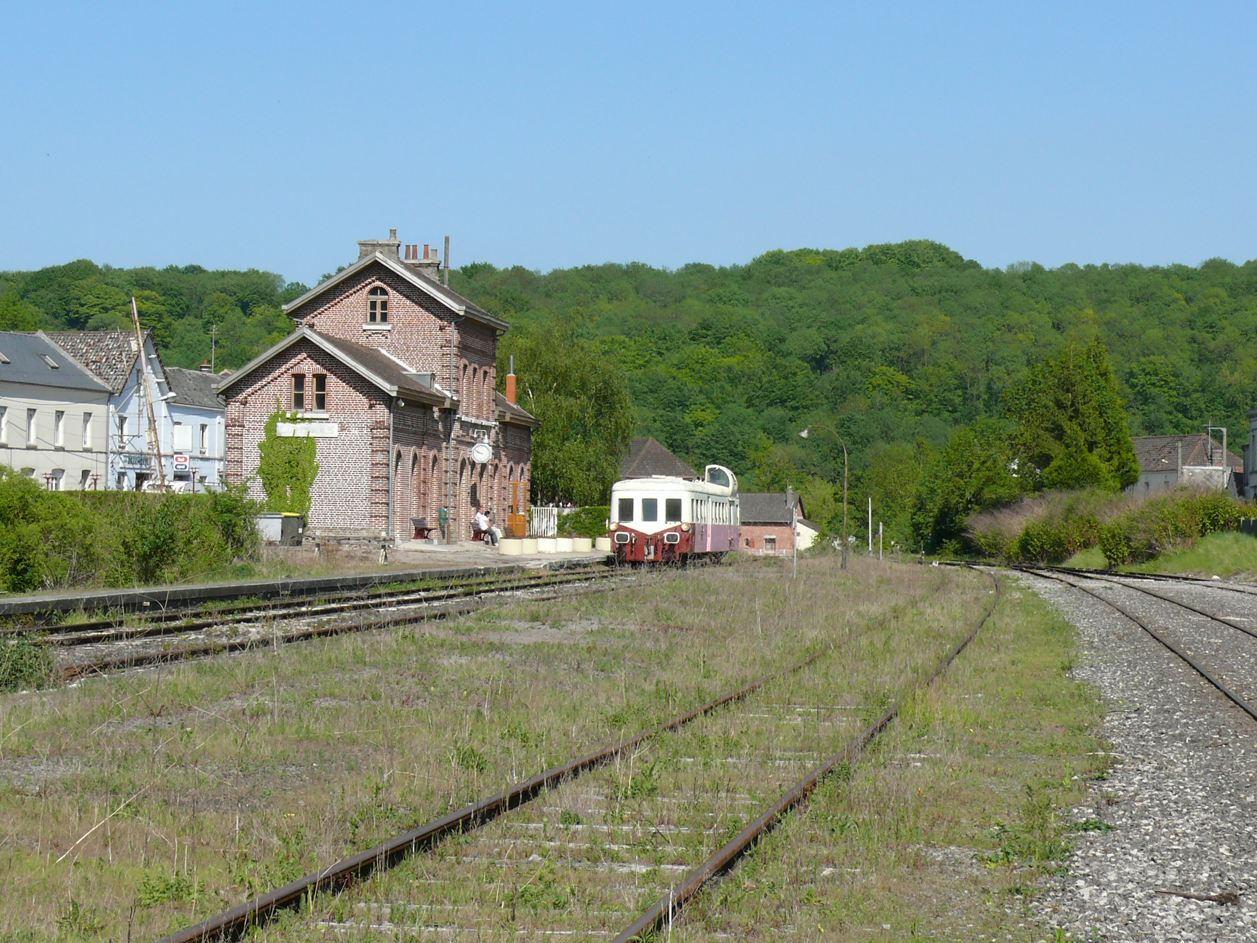 Autorail X 3817 du Chemin de fer touristique de la vallée de l'Aa (CFTVA) en gare de Lumbres, terminus du tronçon de la ligne Saint-Omer - Boulogne exploité par l'association